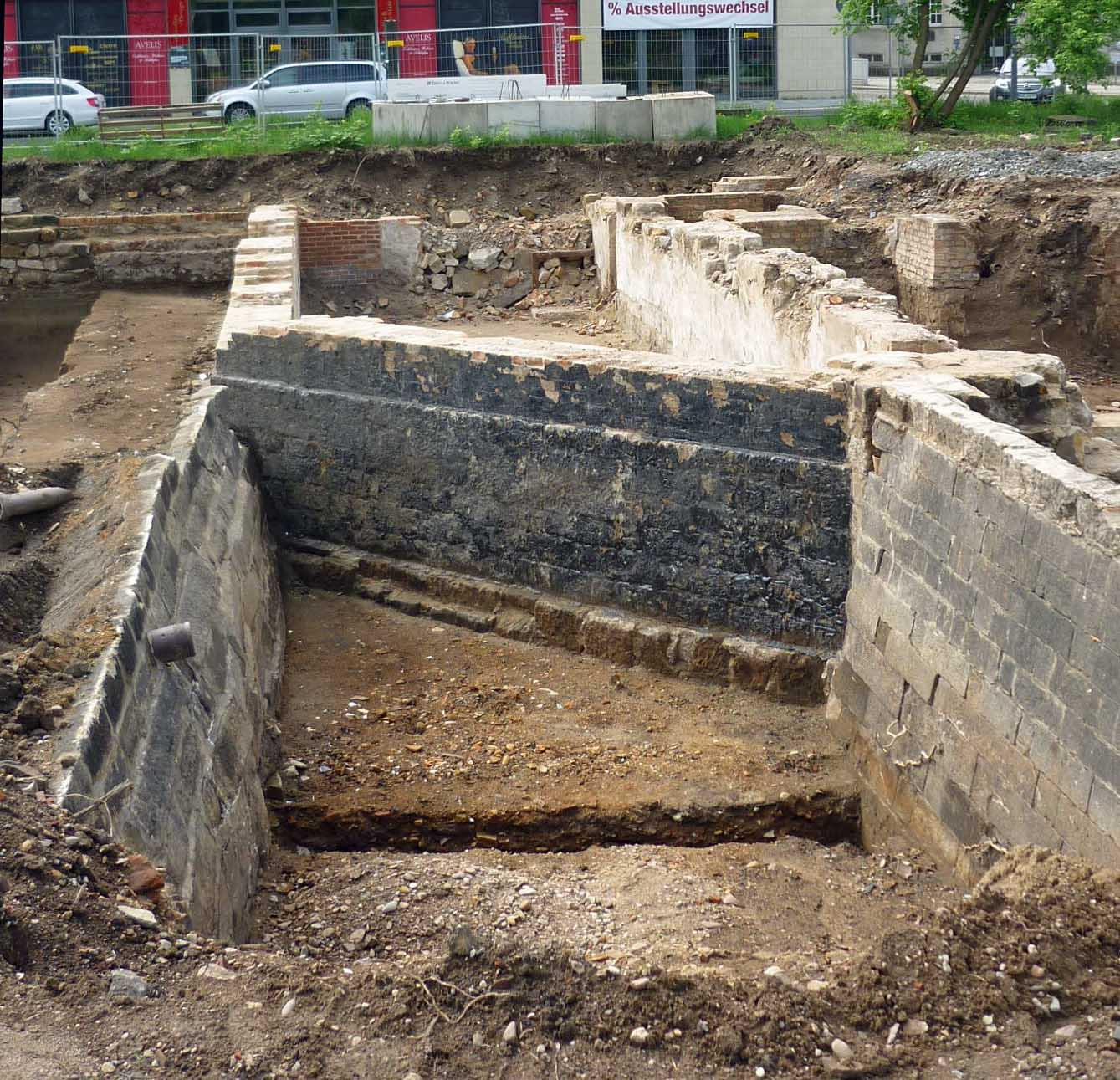 Ehemaliger Weißeritzmühlgraben in der Altstadt von Dresden (Hertha-Lindner-Str.)